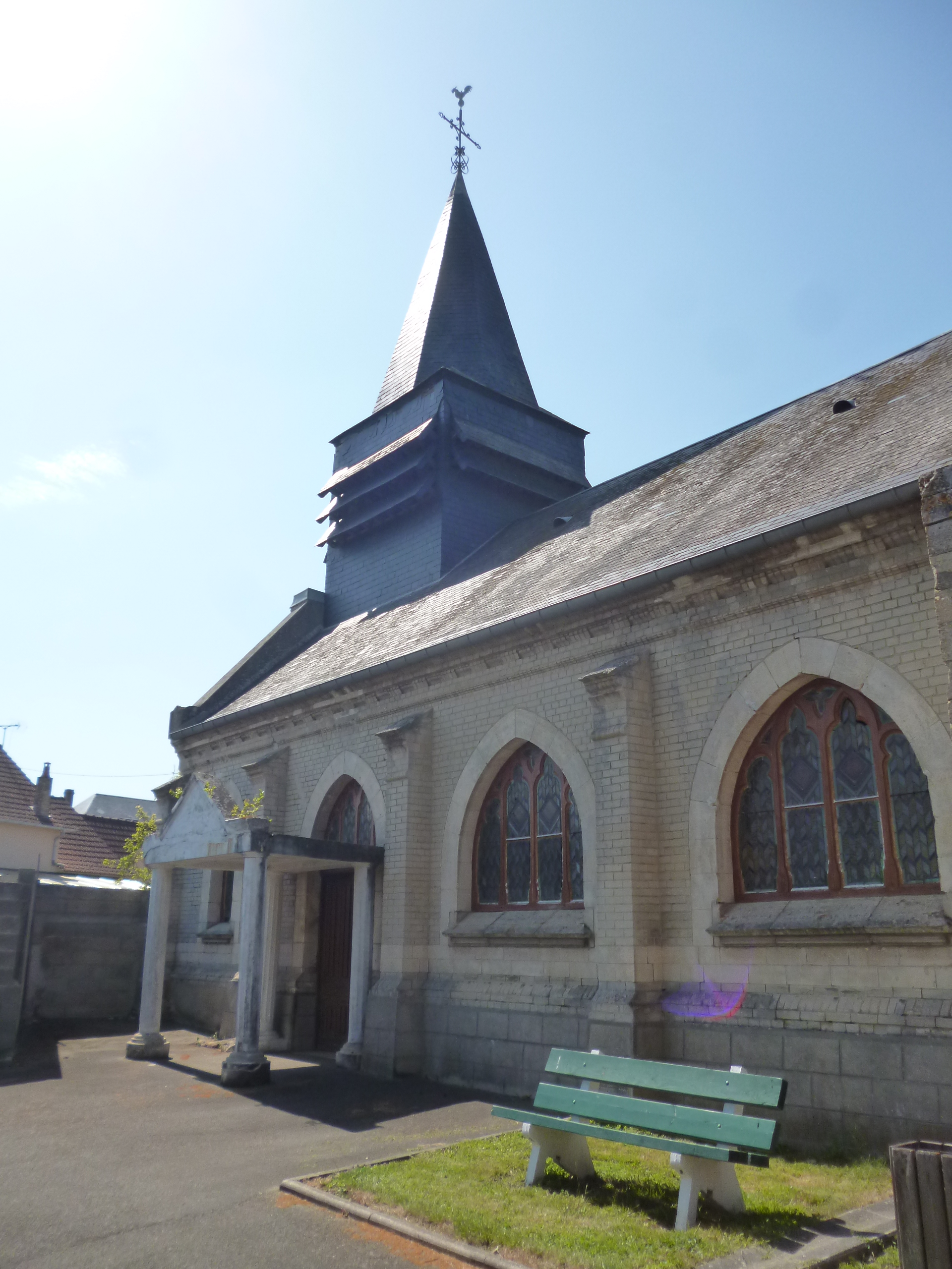 L'église Saint-Lucien de Godenvillers (Oise).